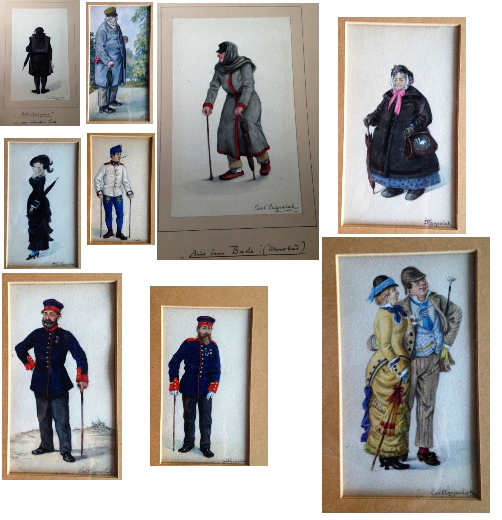 Humorvolle Bilder des böhmischen Malers und Zeichners Carl Czepelak/Karel Čepelák (1852-1893)